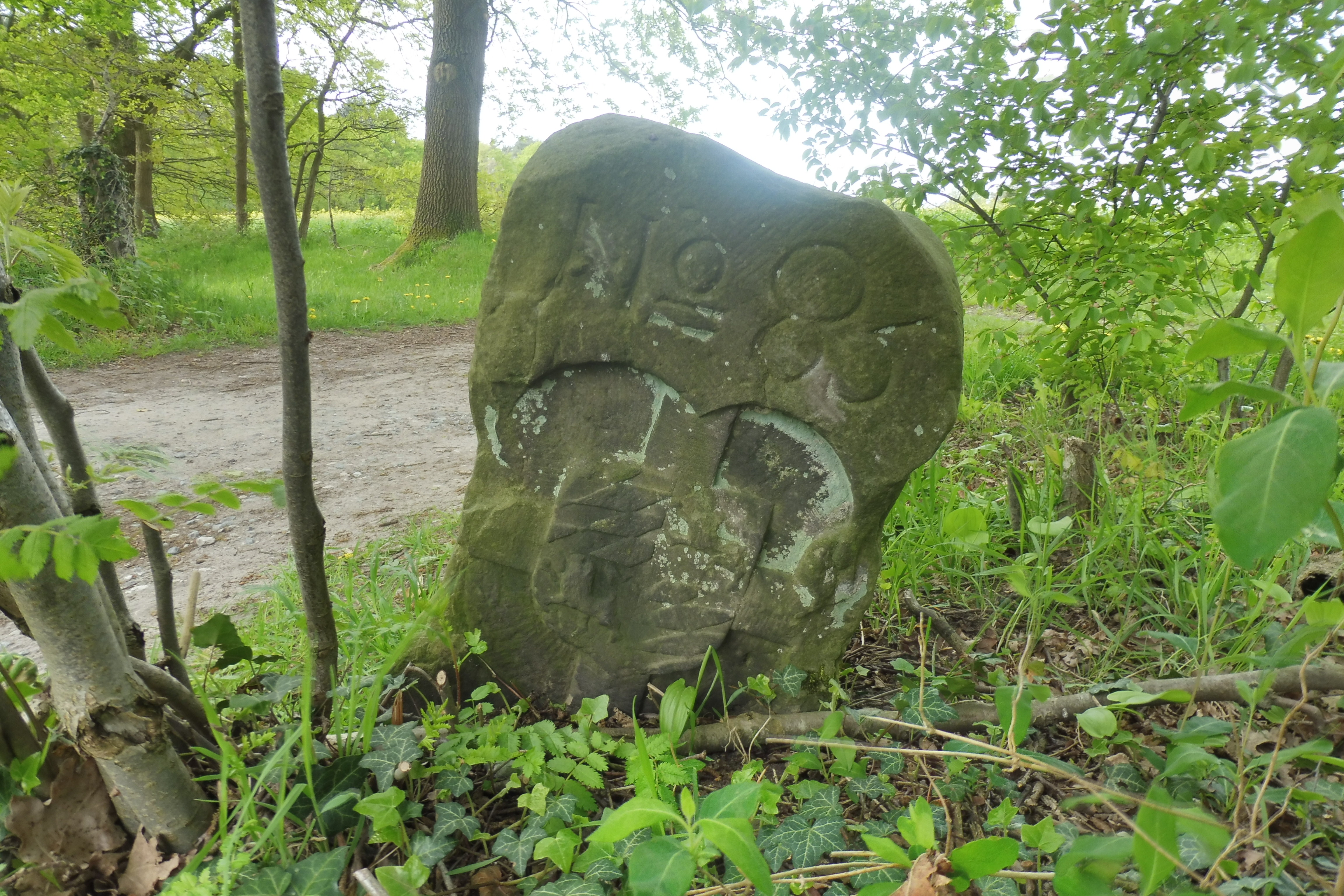 Paderborn-Rietbergischer Grenzstein Nr. 85 (Dreiecksstein) zwischen Schloß Holte (Grafschaft Rietberg) und Stukenbrock (Hochstift Paderborn) – Paderborner Seite